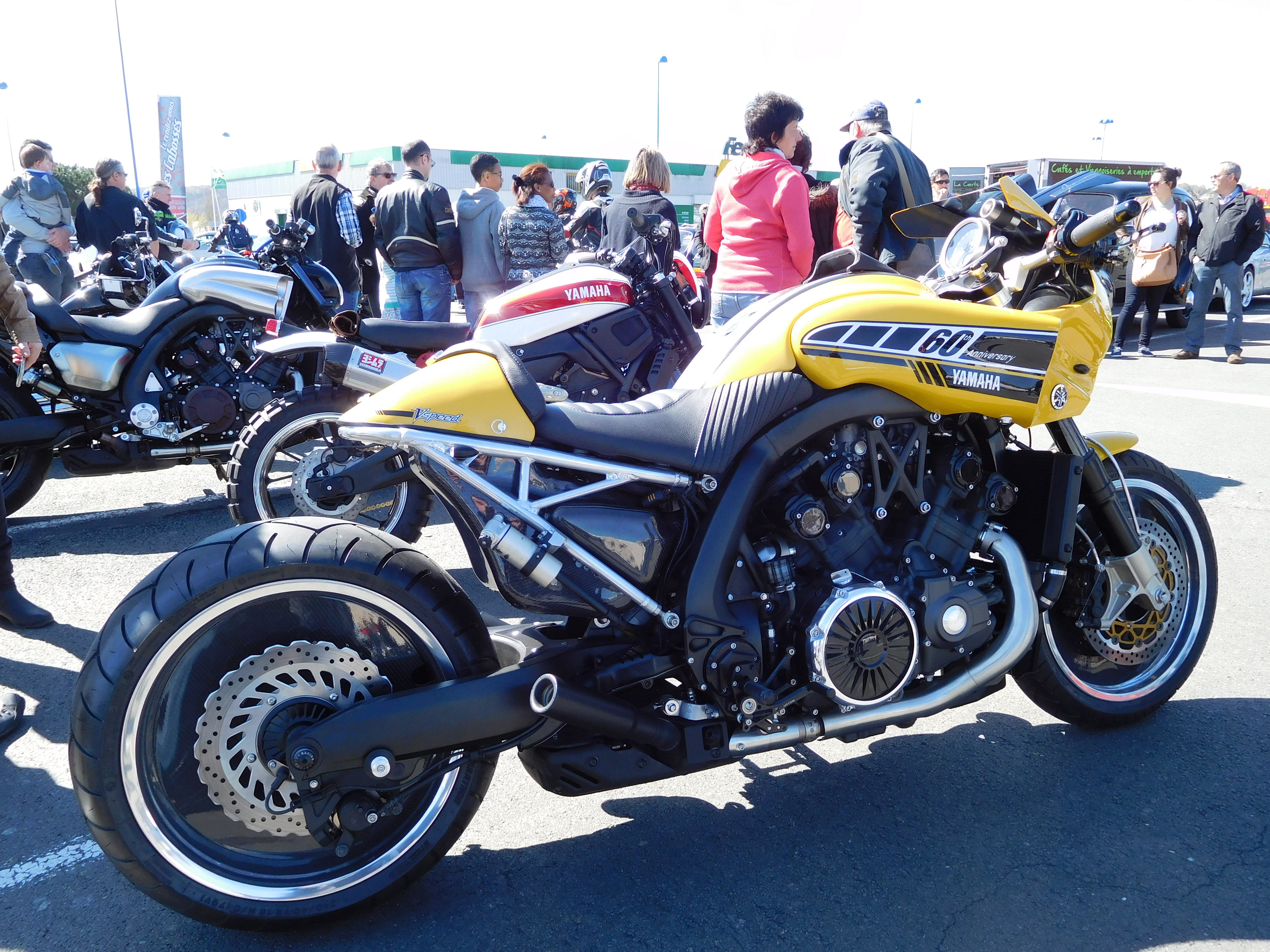 Yamaha VMax V-Speed « Yard Built » by Liberty Yam. Au Rendez-vous des cabossés (France).